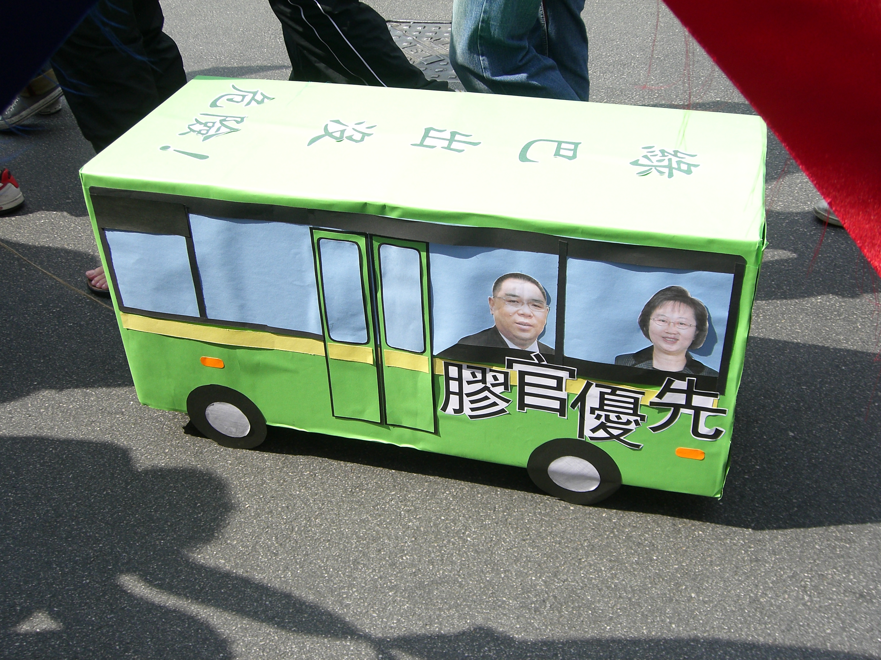 2012年澳門勞動節遊行